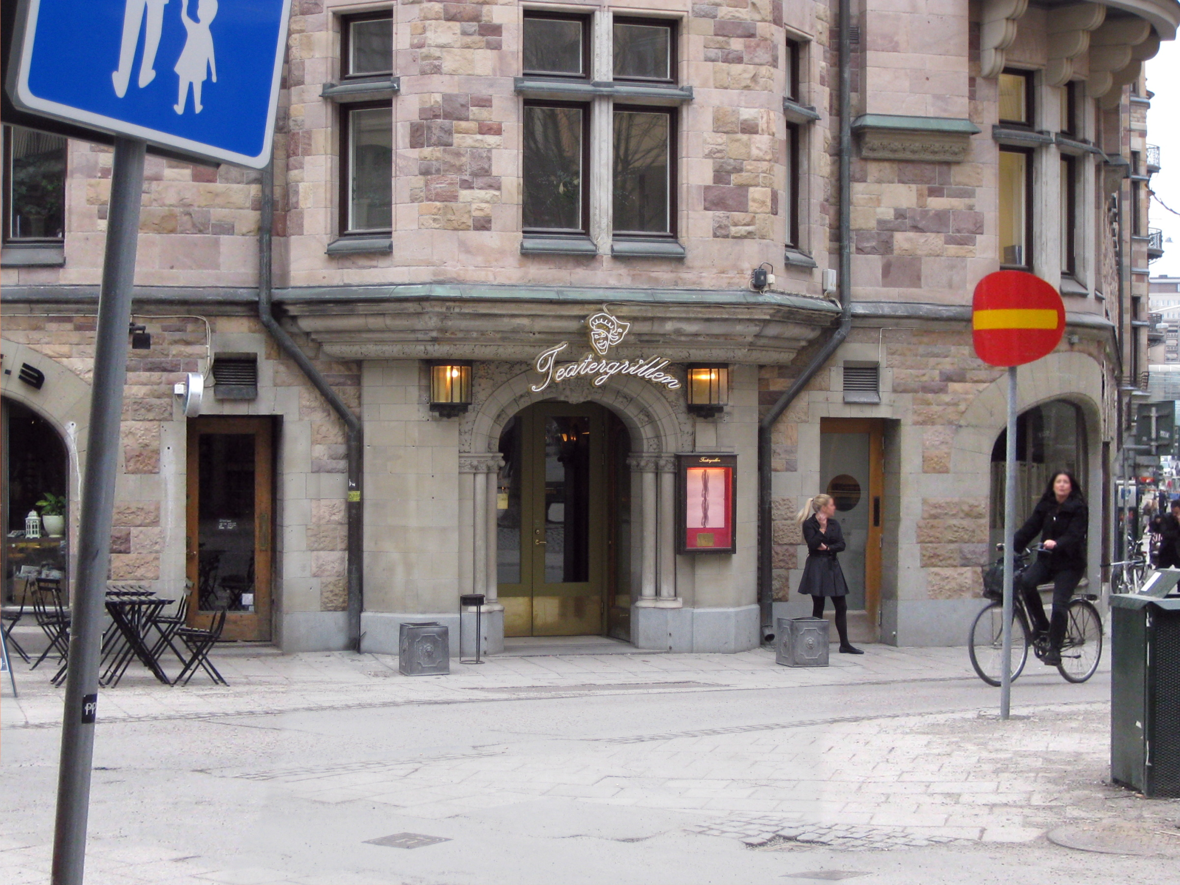 Teatergrillen vid Nybroplan, Stockholm